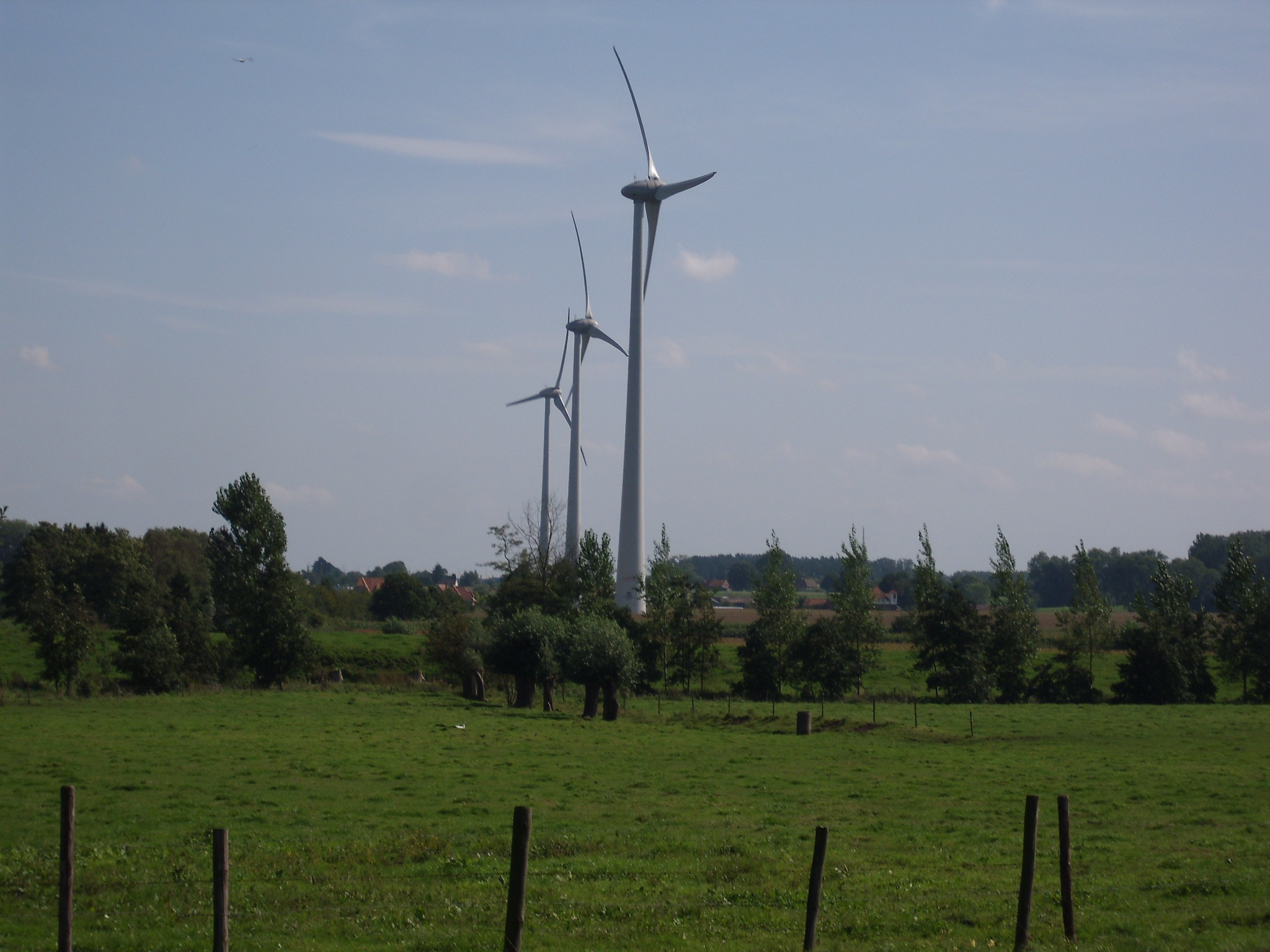 Windmolens Luminus - Proefhoevestraat - Melle - Oost-Vlaanderen - Vlaanderen - België